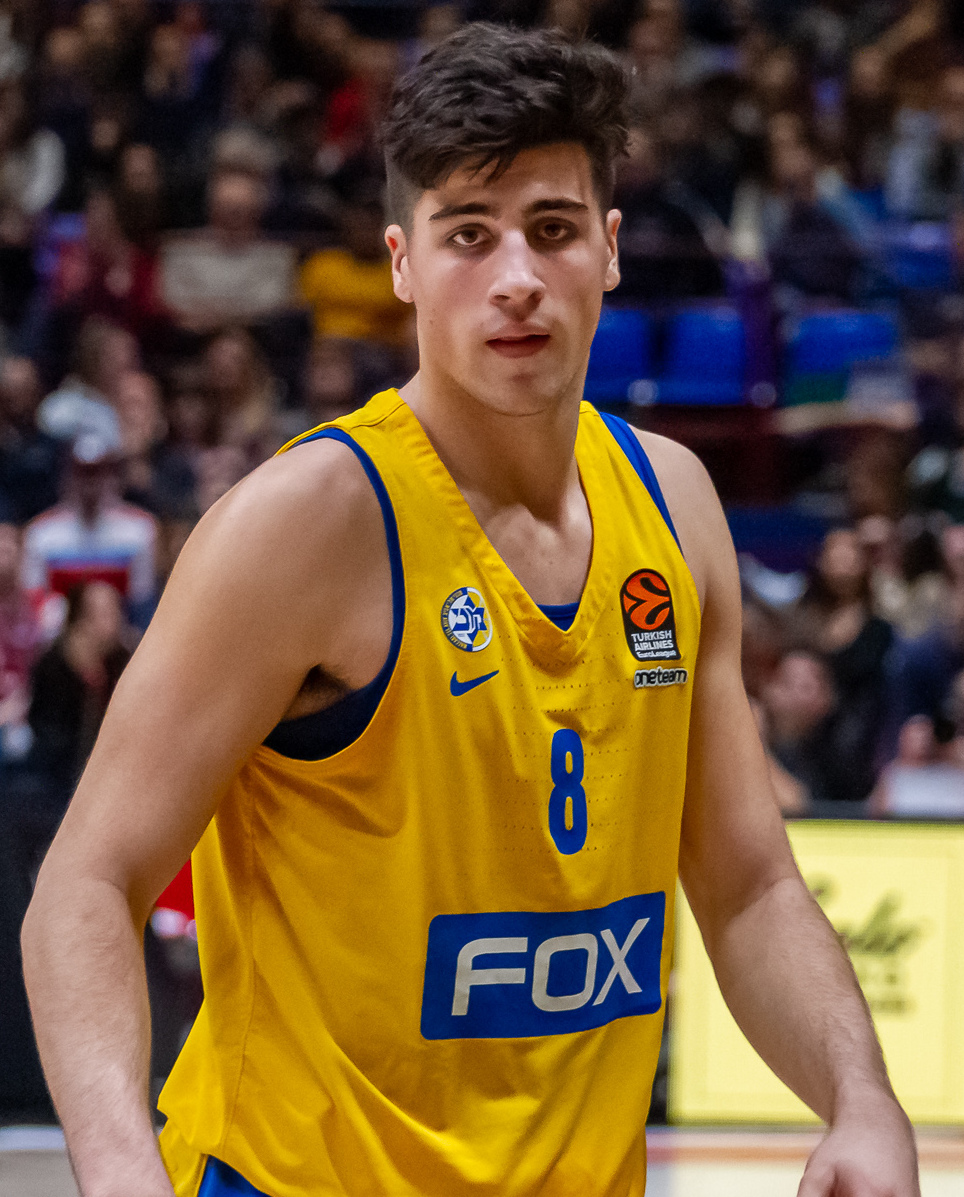 EuroLeague - Olimpia vs Maccabi